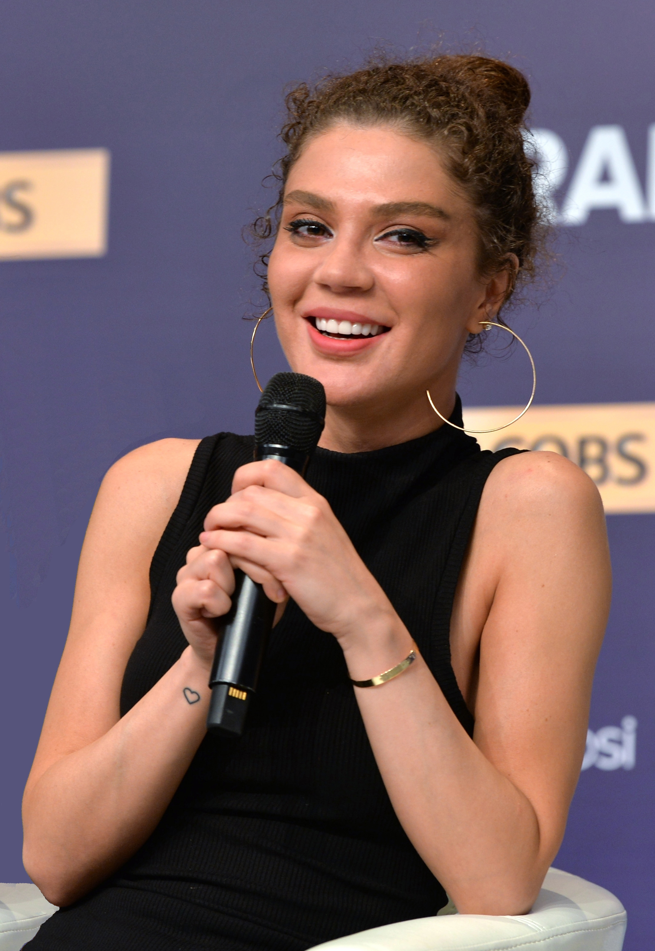 Tamara Gachechiladze in Kyiv